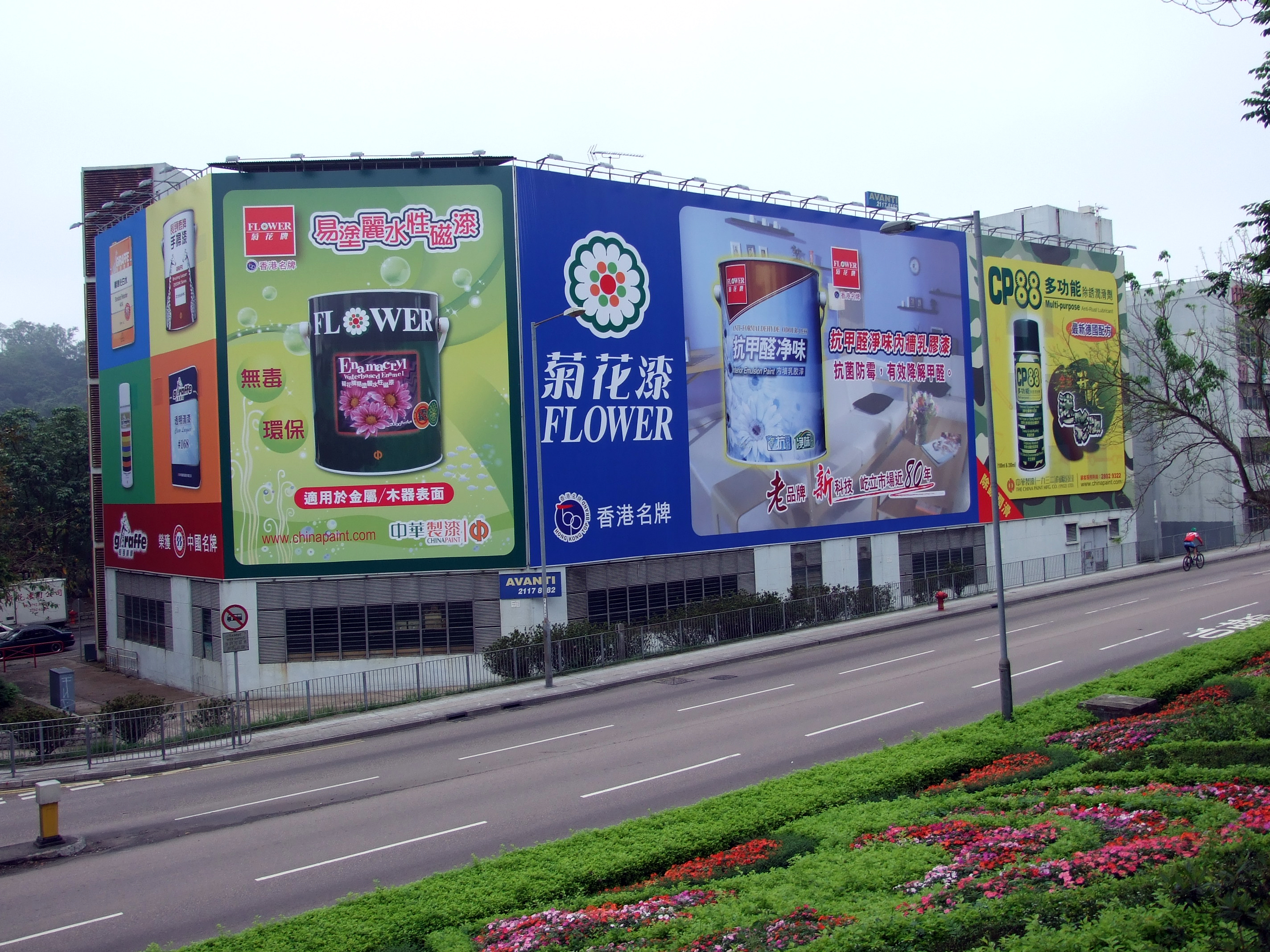 中文（香港）: 中華製漆西貢工廠